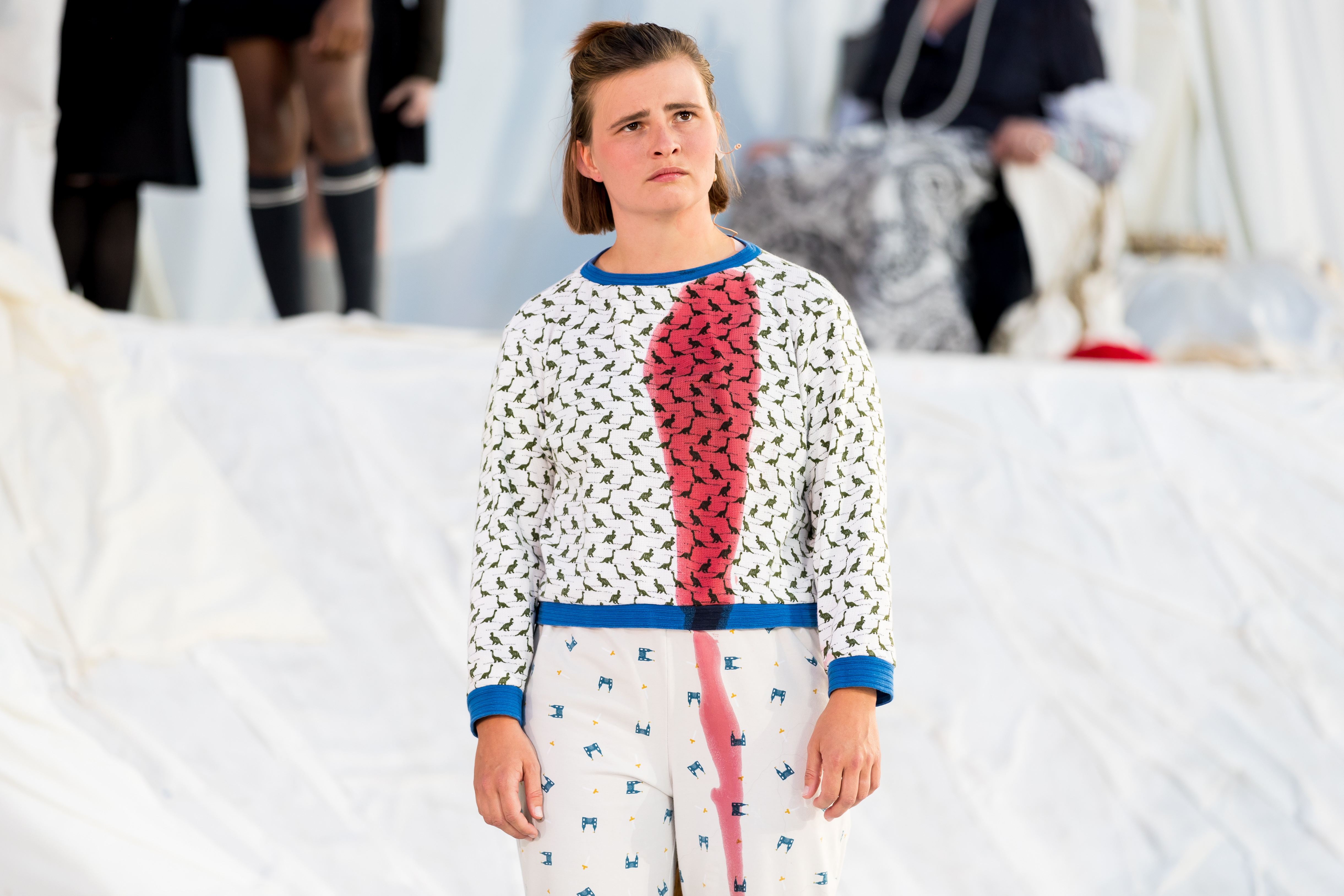 Lisa Hrdina during Nibelungenfestspiele ( at Worms, Rheinland-Pfalz, Germany on 2019-07-10, Photo: Sven Mandel